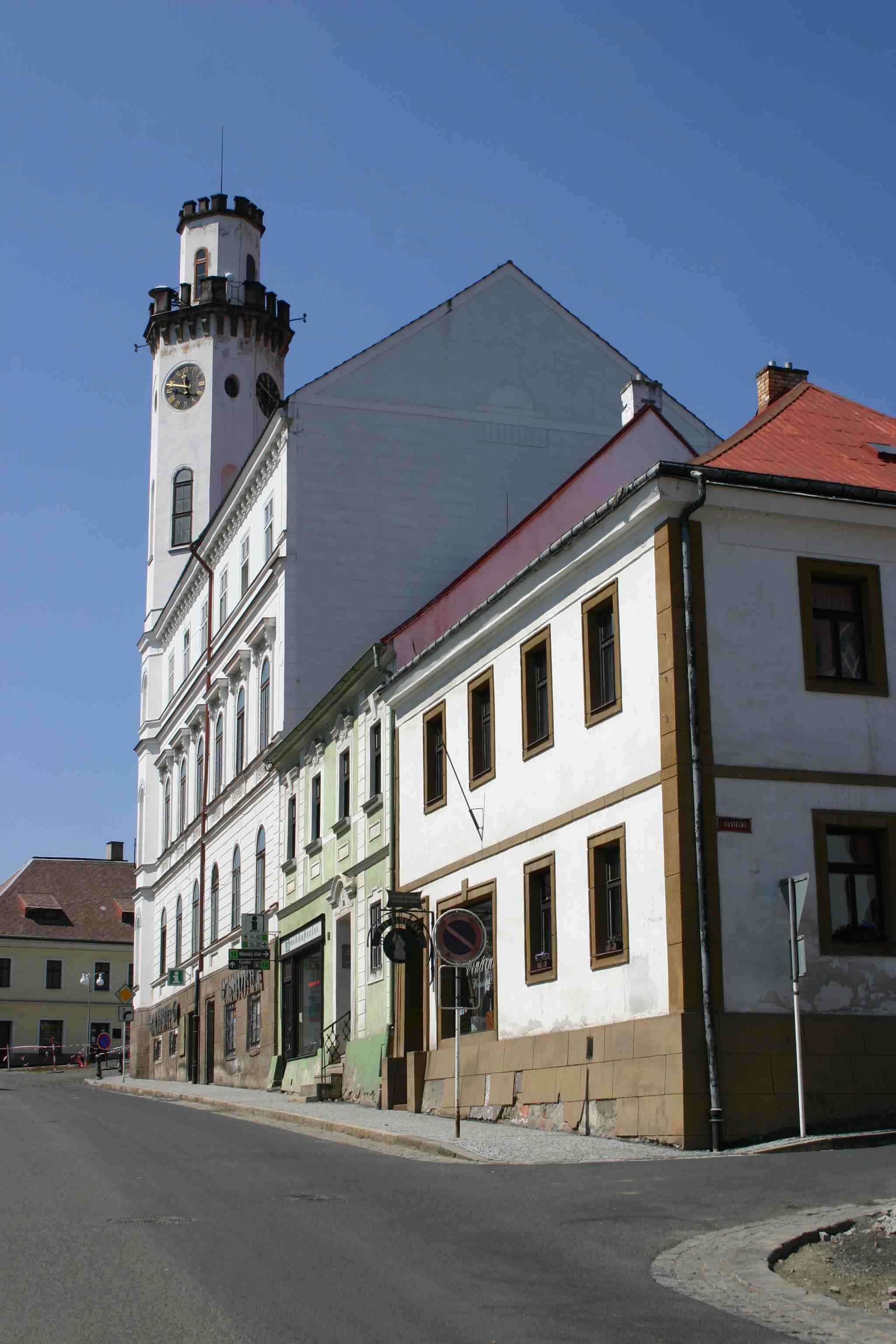 Klášterec nad Ohří - Rathaus